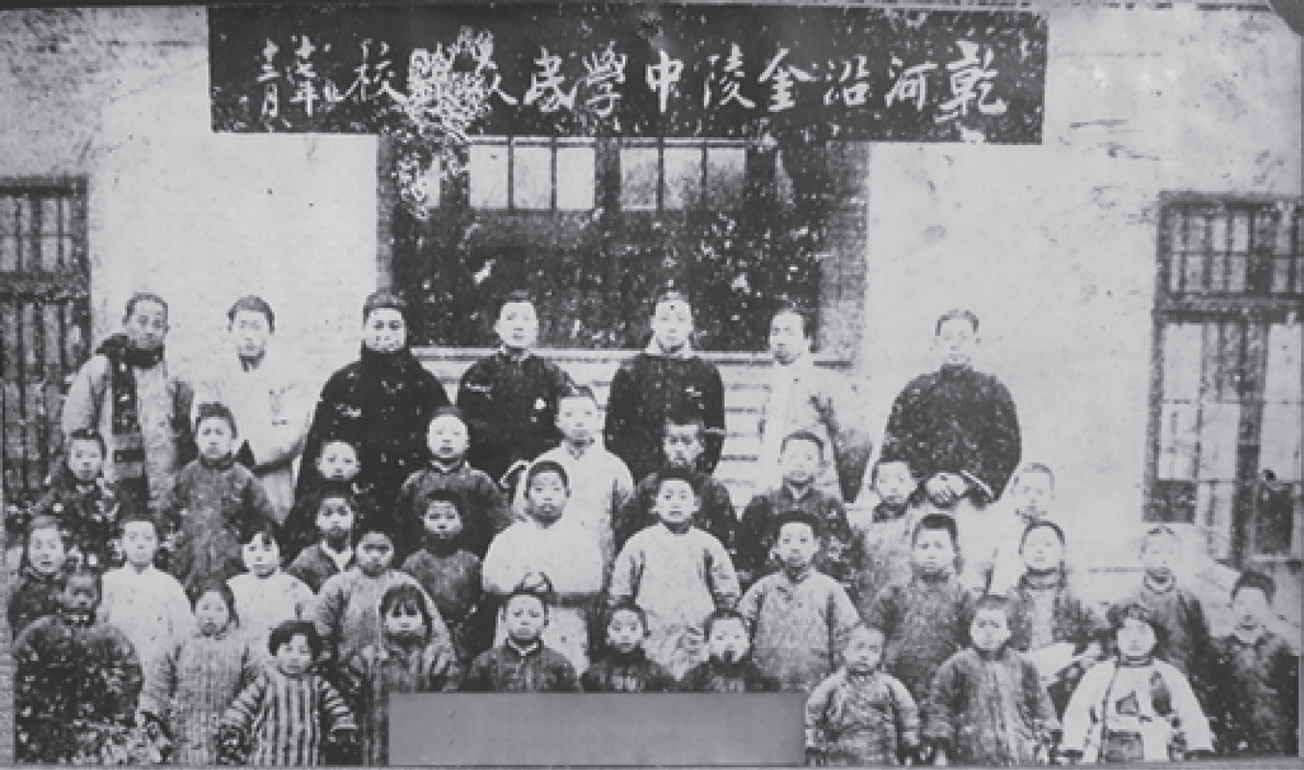 20世纪20年代，中华教育改进社在陶行知先生的倡导下，先后创办了试验乡村师范学校、晓庄中心小学、中心幼稚园和民众夜校、晓庄医院、乡村救火会等社会文化教育机构，并于1928年2月改名为晓庄学校，陶行知任校长。图为1928年设于干河沿金陵中学的民众夜校师生合影。